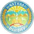 Chatkal